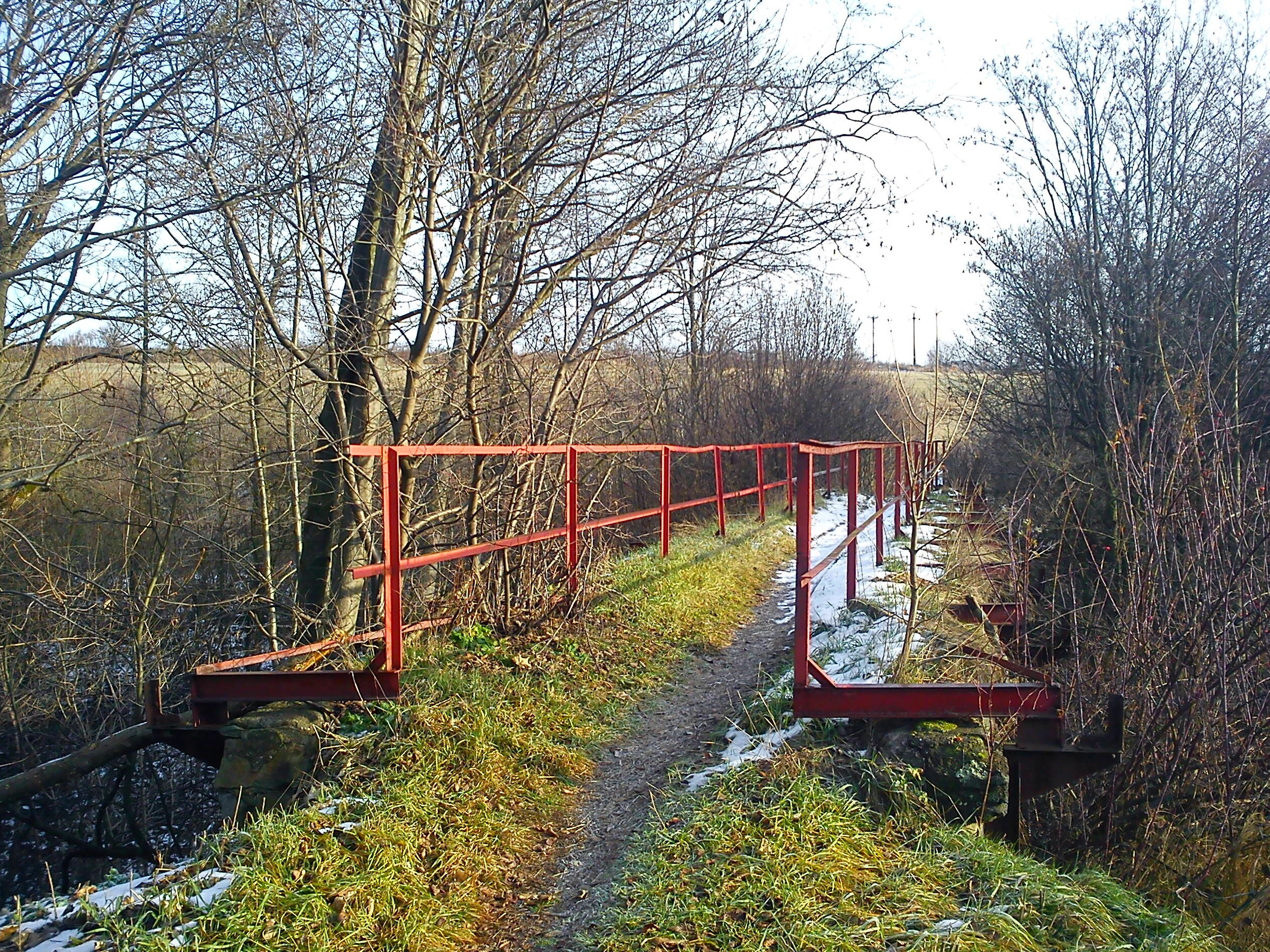 Lávka u berounského nádraží v okrese Bruntál.